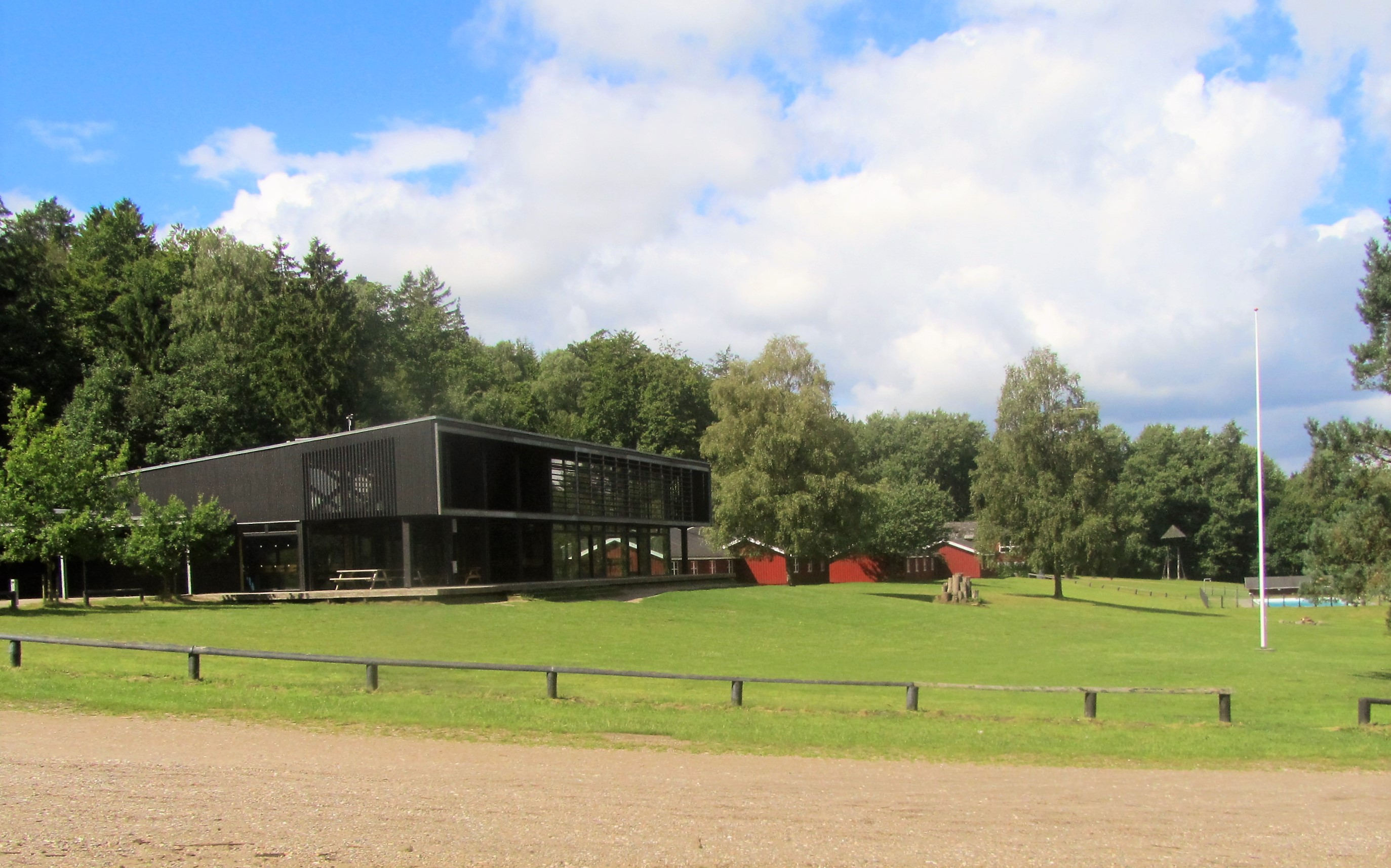 Den nye hovedbygning